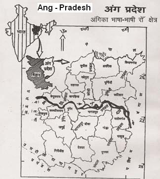 Angika speaking area, India